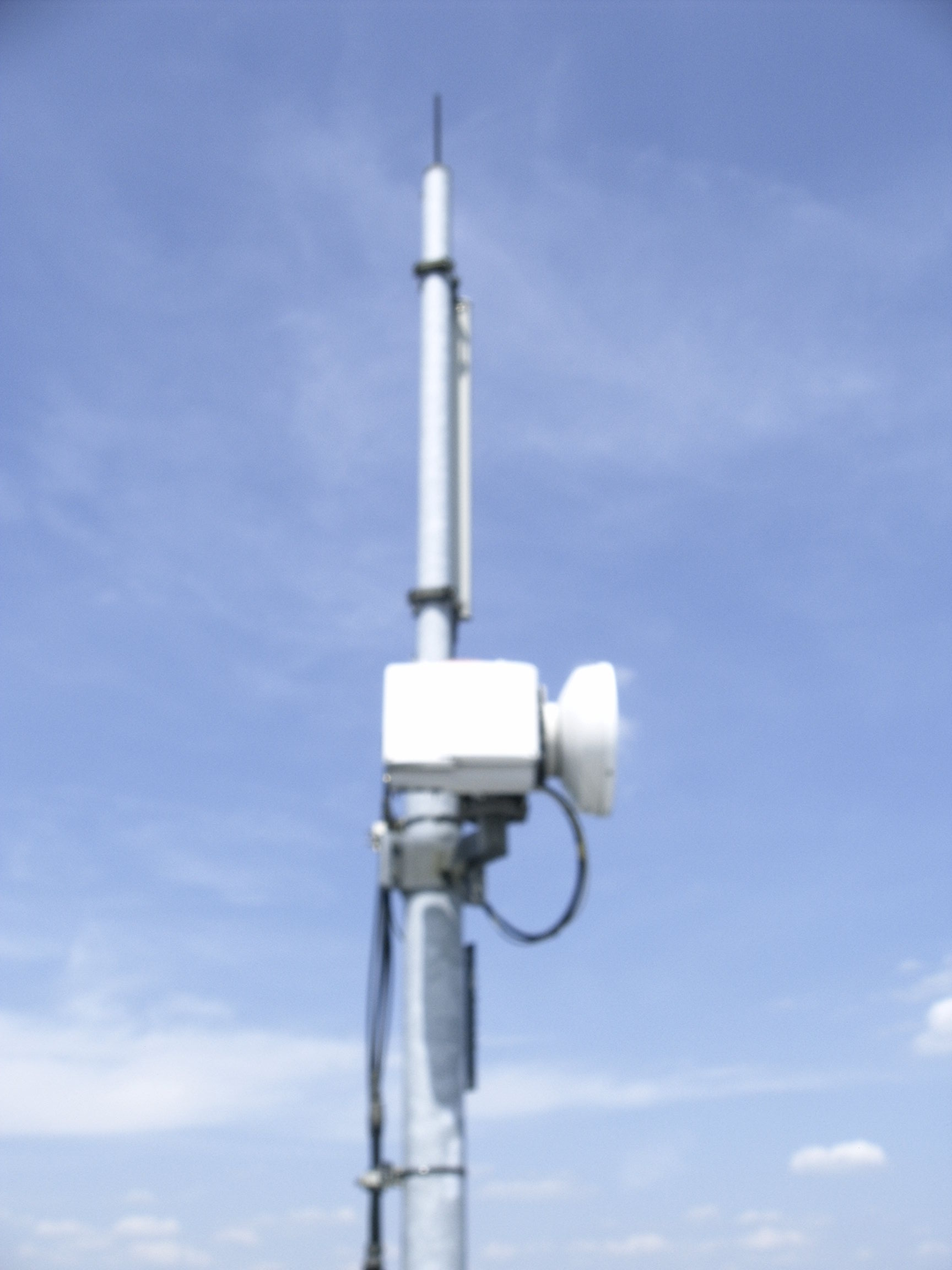 Mobiele telefoon mast van T-mobile op ongeveer 60 meter hoogte